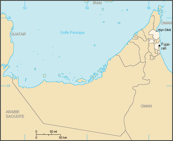 Description:Carte de l'émirat de Fujairah,Emirats arabes unis Auteur:Rémih